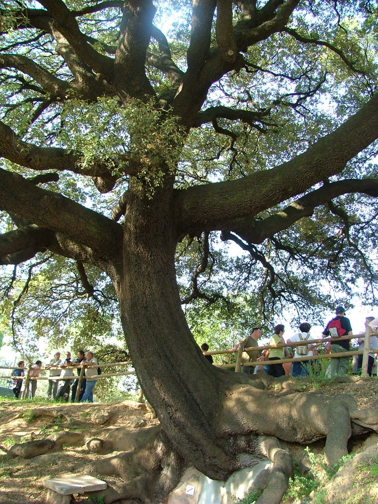 Alzina de la font de Can Massanet, a Vilafant. This is a a photo of a protected or outstanding tree in Catalonia, Spain, with id: MA-02.221.01